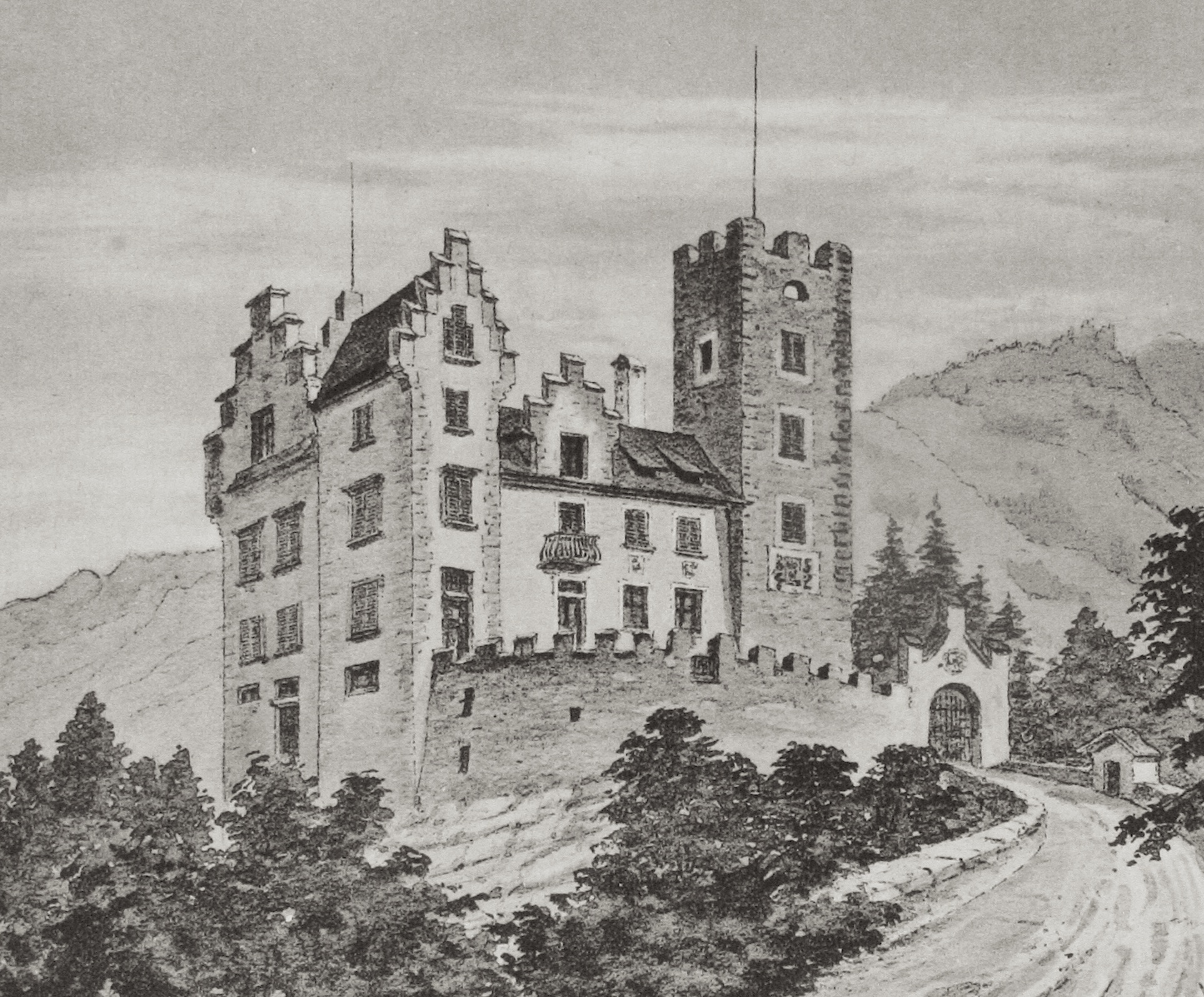 Schloss Baldenstein um 1878, nach einem Aquarell von F. Küpfer